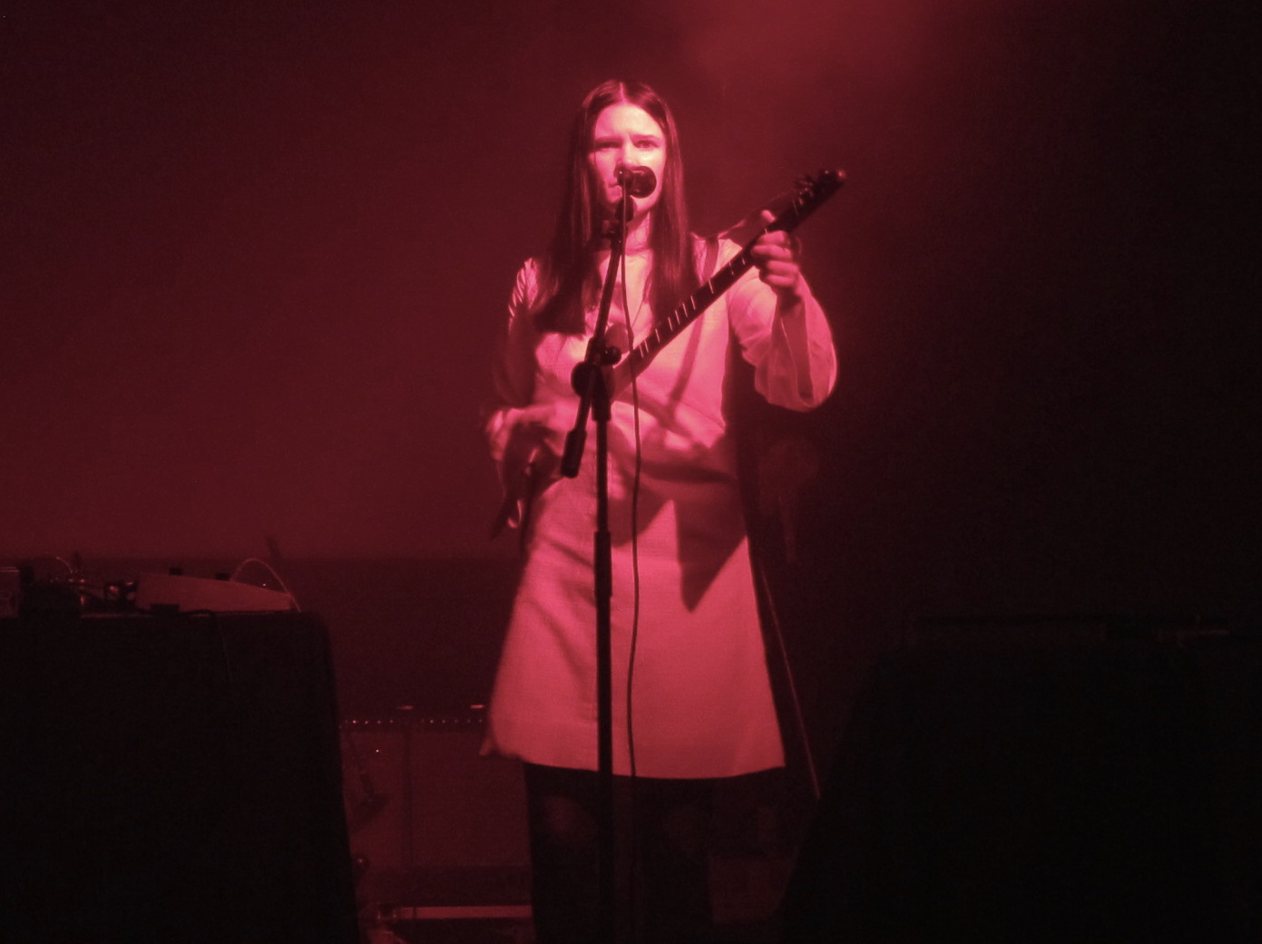 Sónar Galicia Corunha 17-19 Jun 2010